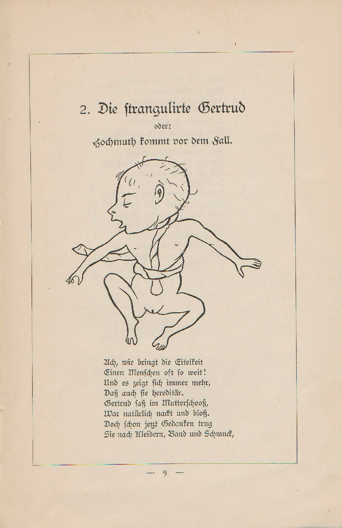 Die strangulirte Getrud. Darstellung einer Nabelschnurumschlingung im Kurzen gynaekologischen Struwelpeter.